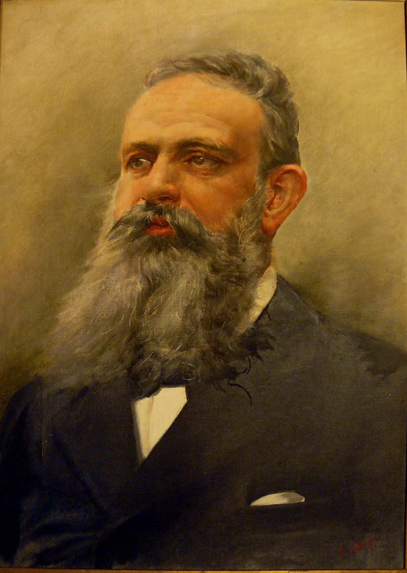 Descrizione: Ritratto di Felice Bisleri, ad opera di Antonino Gandolfo